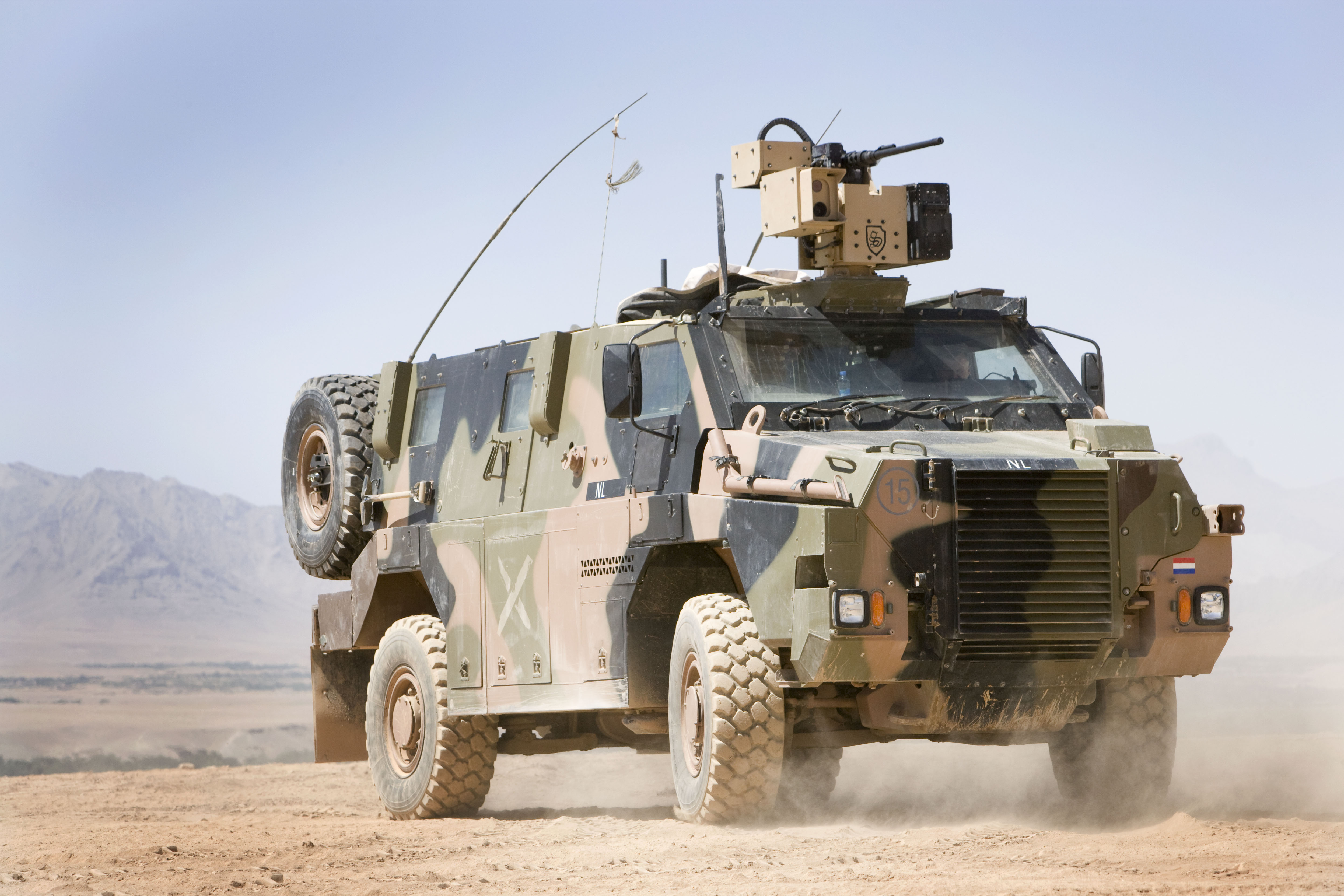 TFU Task Force Uruzgan Afghanistan Nieuwe bushmaster met een van binnenuit te besturen .50